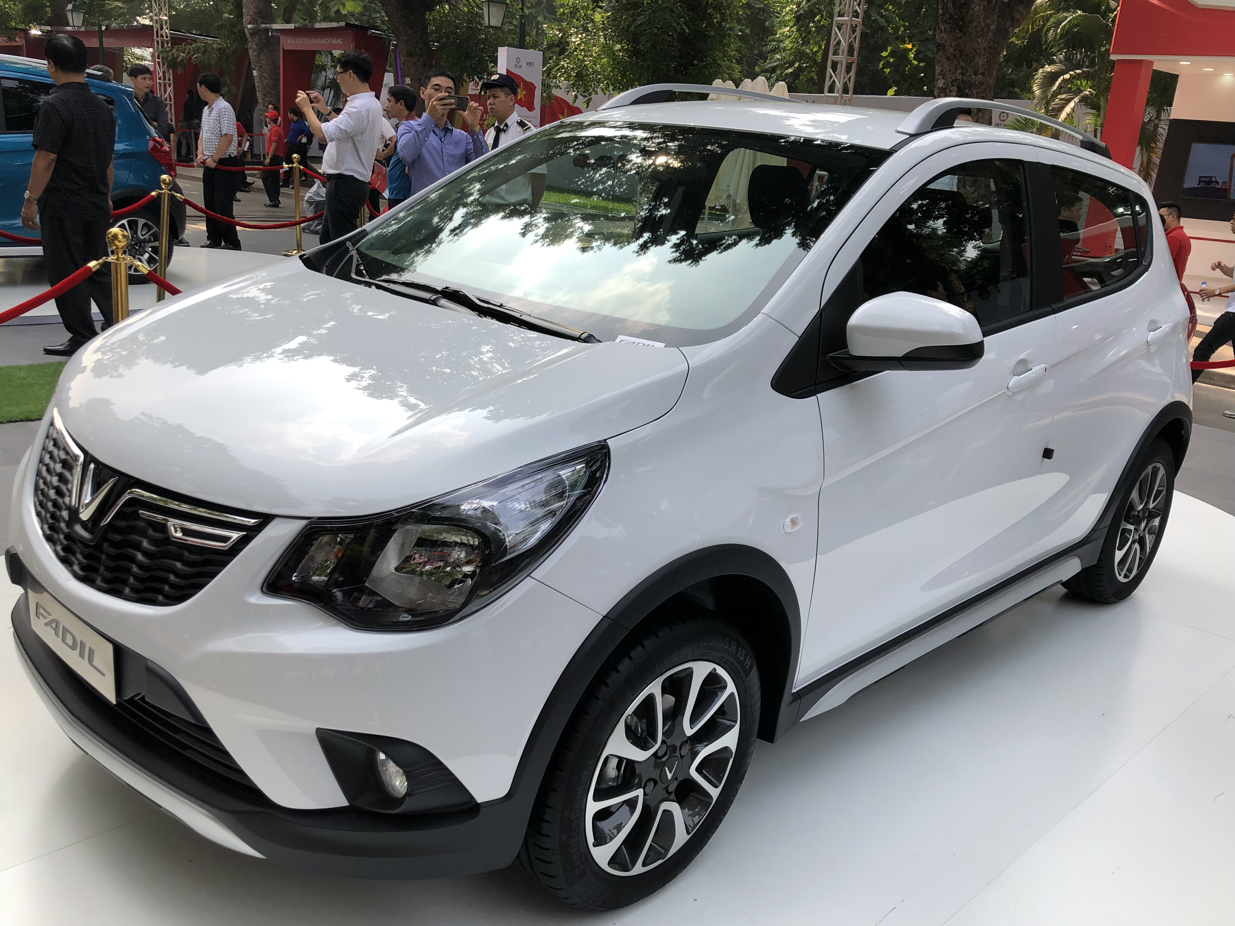 Xe hơi VinFast Fadil ngày mở bán